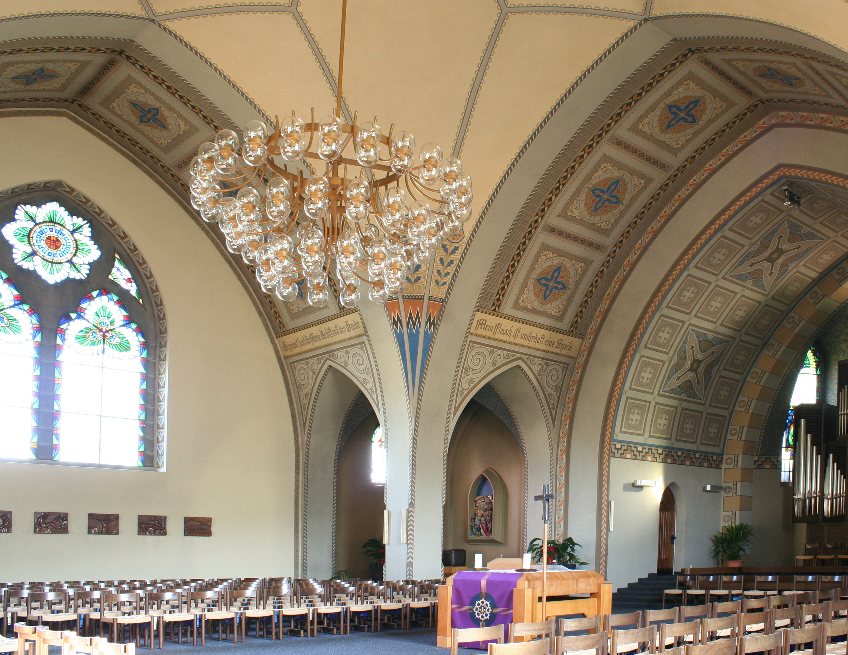 Römisch-katholische Pfarrkirche St. Josef Winterthur-Töss, Altar